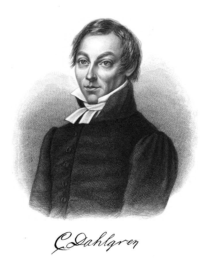 Carl Fredric Dahlgren (1791-1844)